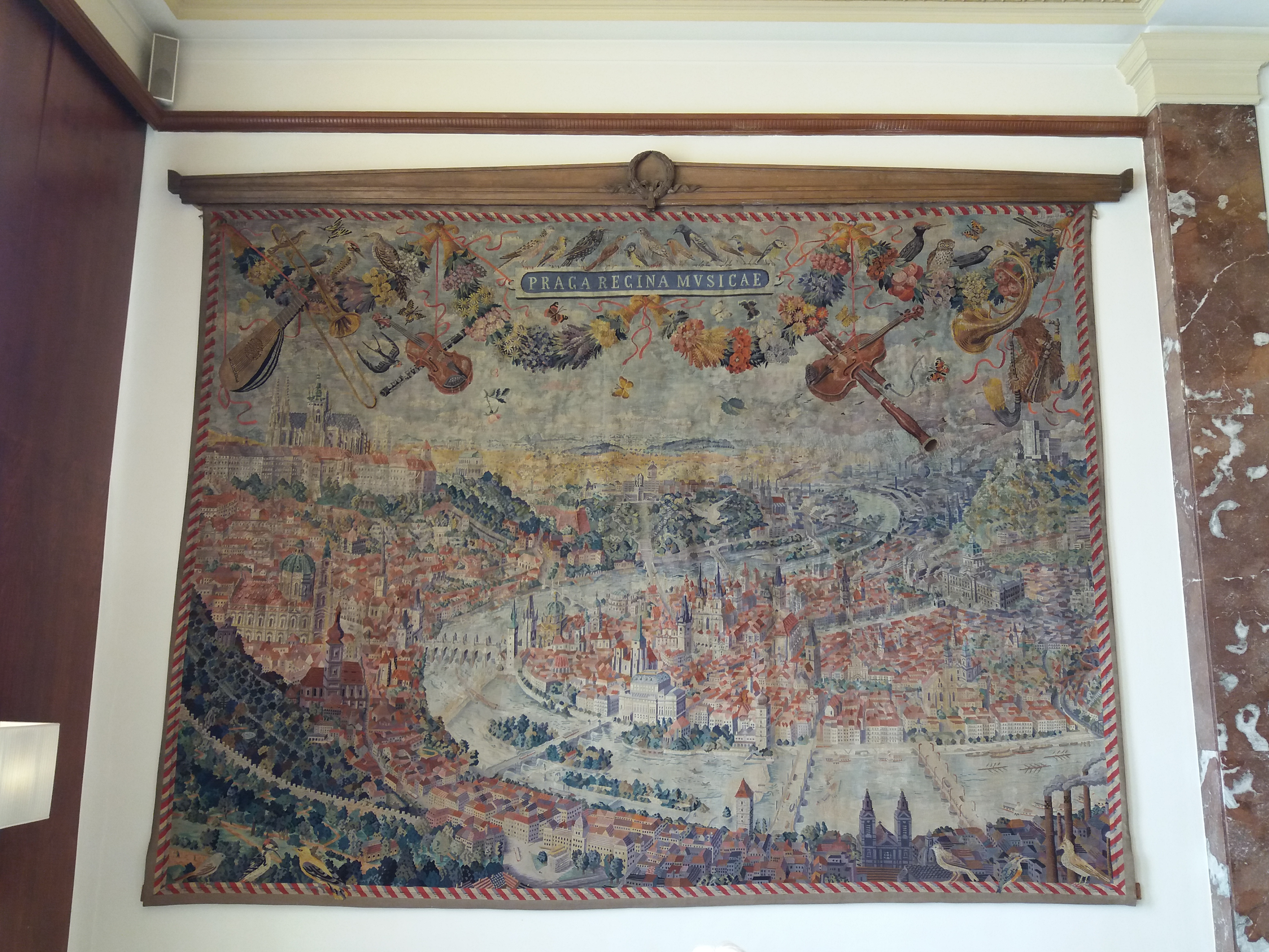 Tapisérie s motivem Prahy a Stalinovym pomníkem.